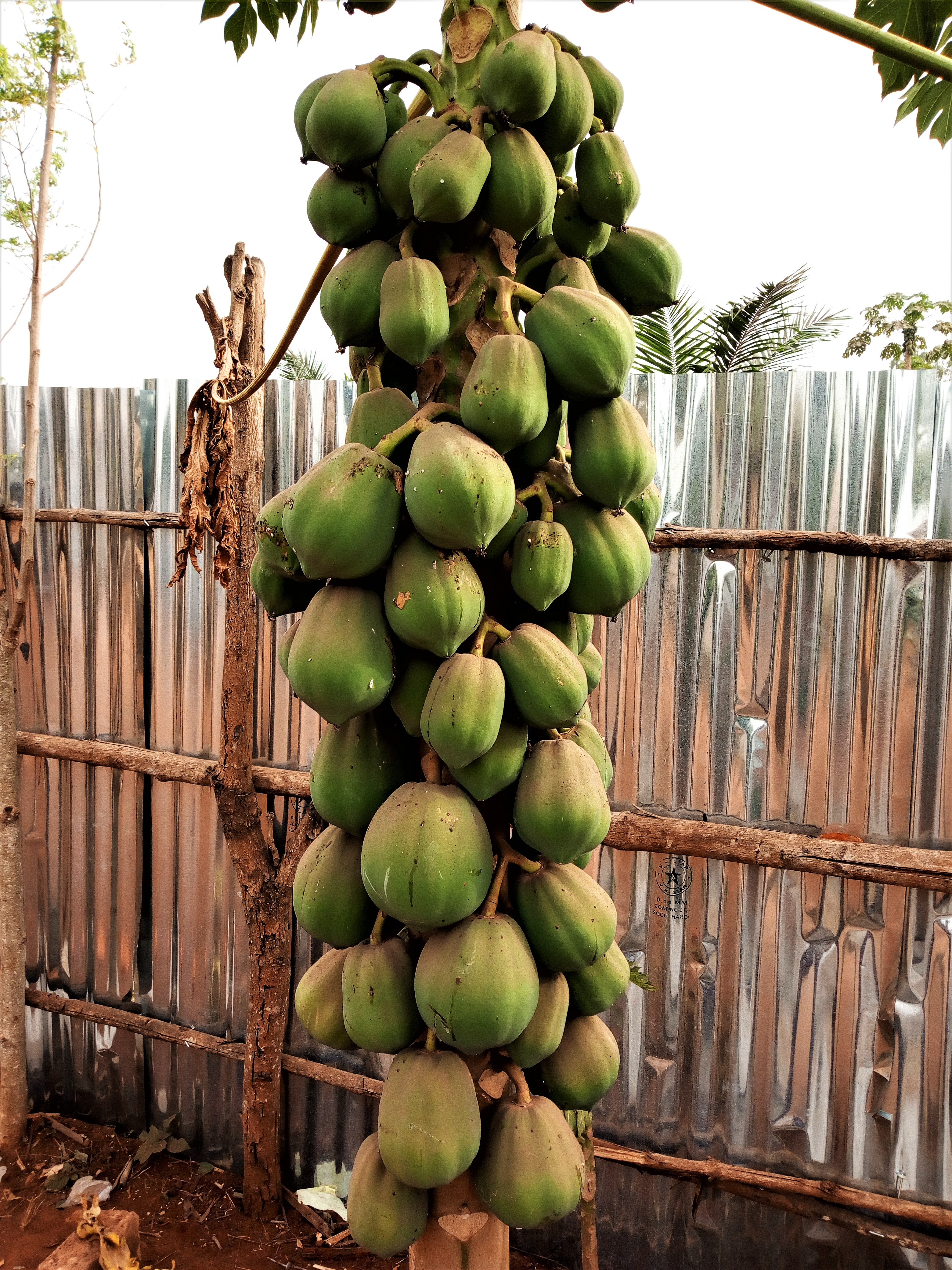 Des papayes au tronc du papayer au Bénin